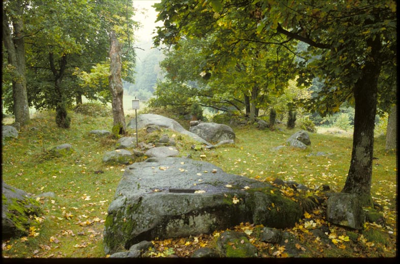 Åryd 58:1. Hällristning, bestående skålgropar och en runrad (DR 361) ristad på en av fem block. Motiv: Åryd 58:1 Kategori: Plats med tradition, Runristning/runsten Åryd 58:1. Hällristning, bestående skålgropar och en runrad ristad på en av fem block. Åryd 58:1.